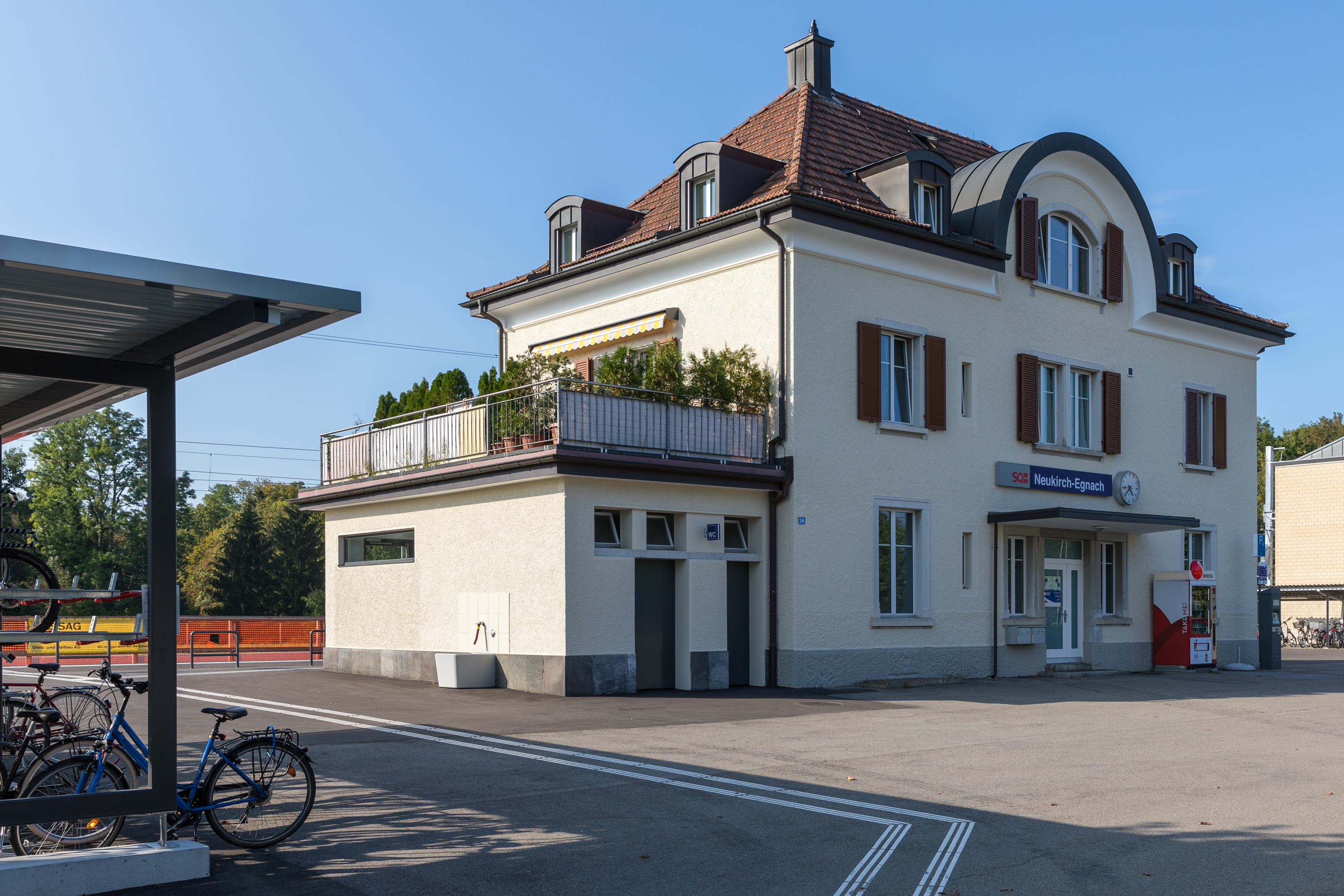 SOB-Bahnhof Neukirch-Egnach an der Strecke Romanshorn - St. Gallen.